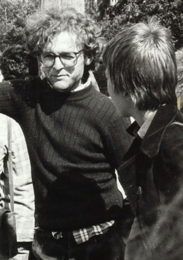 Andreas Maislinger als ASF-Freiwilliger beim Muzeum Auschwitz Birkenau